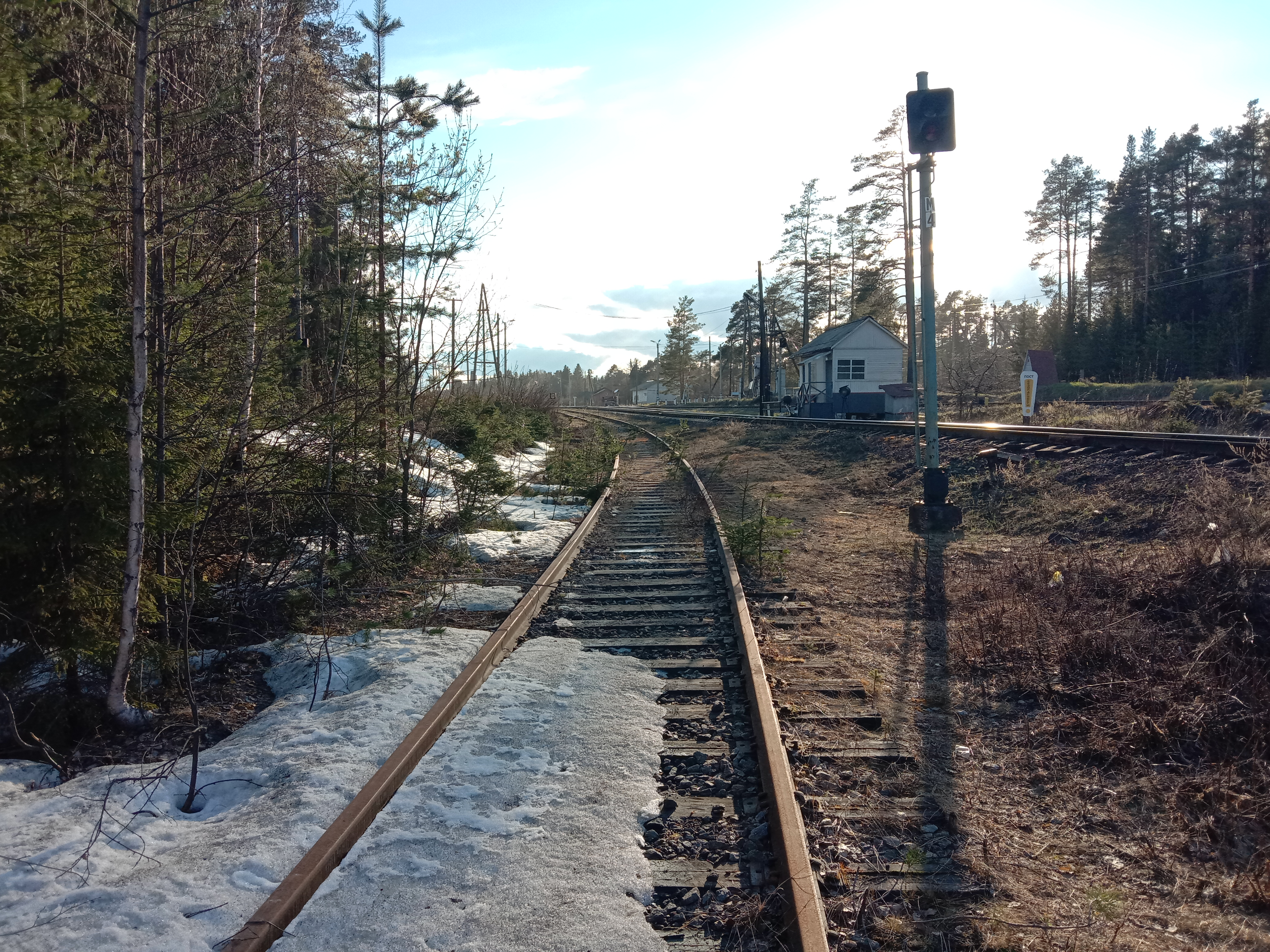 Яккима